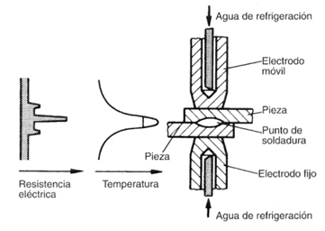 Un dibuix sobre com és la soldadura per punts amb les seves parts més importants.